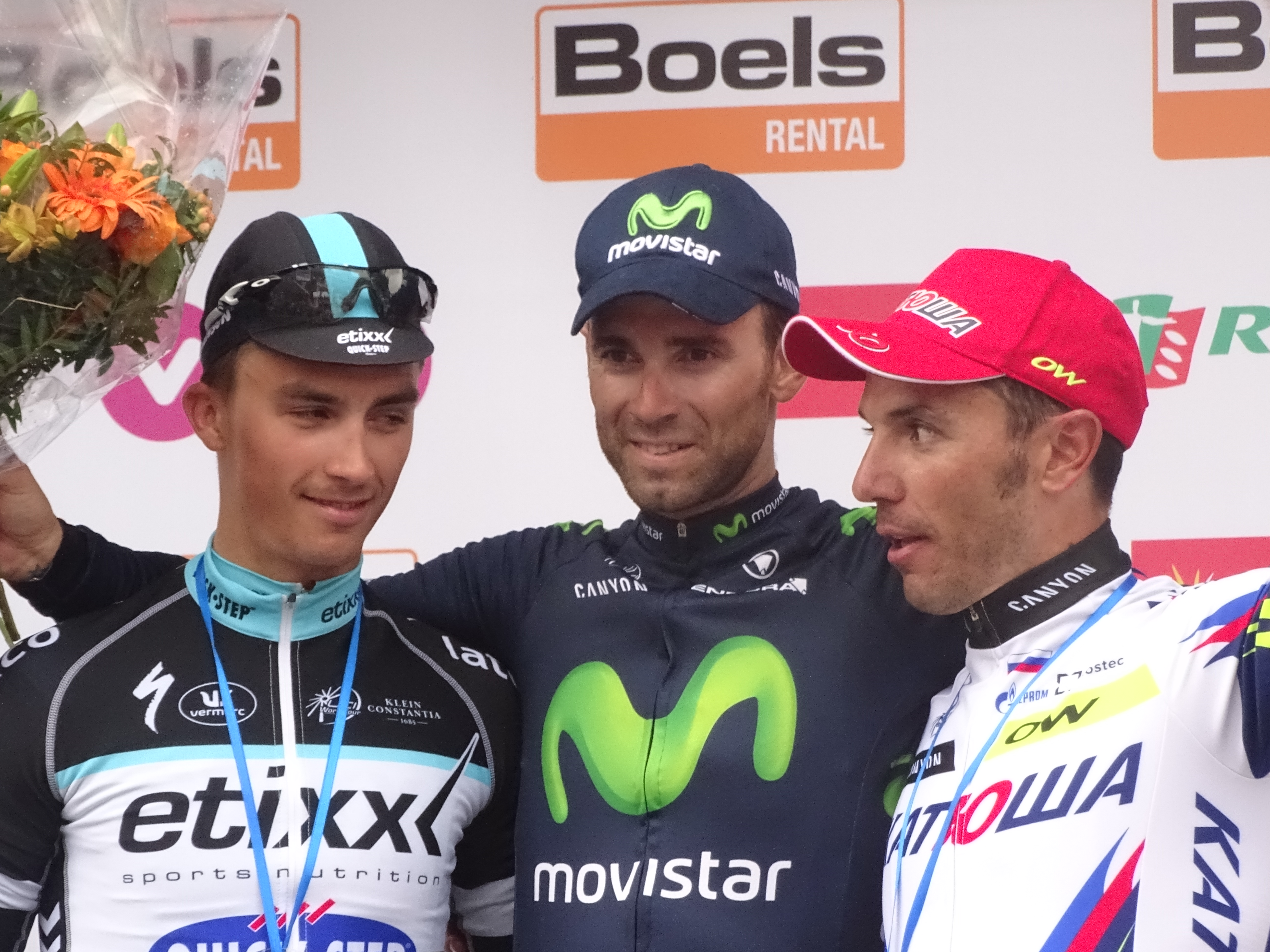 Reportage réalisé le dimanche 26 avril à l'occasion de l'arrivée de Liège-Bastogne-Liège 2015 à Ans, Belgique.